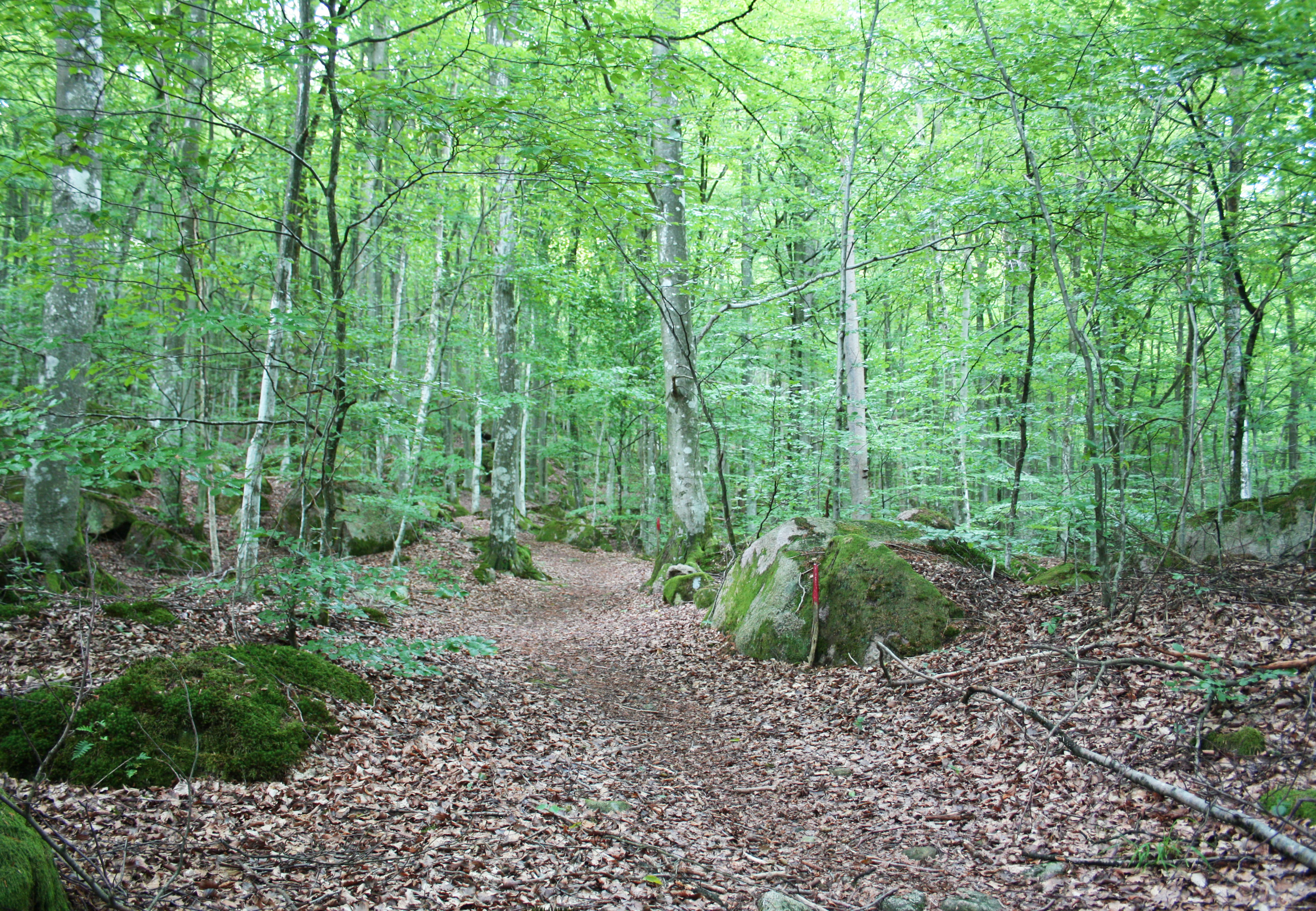 Skinsagylet, promenadstigen genom området.